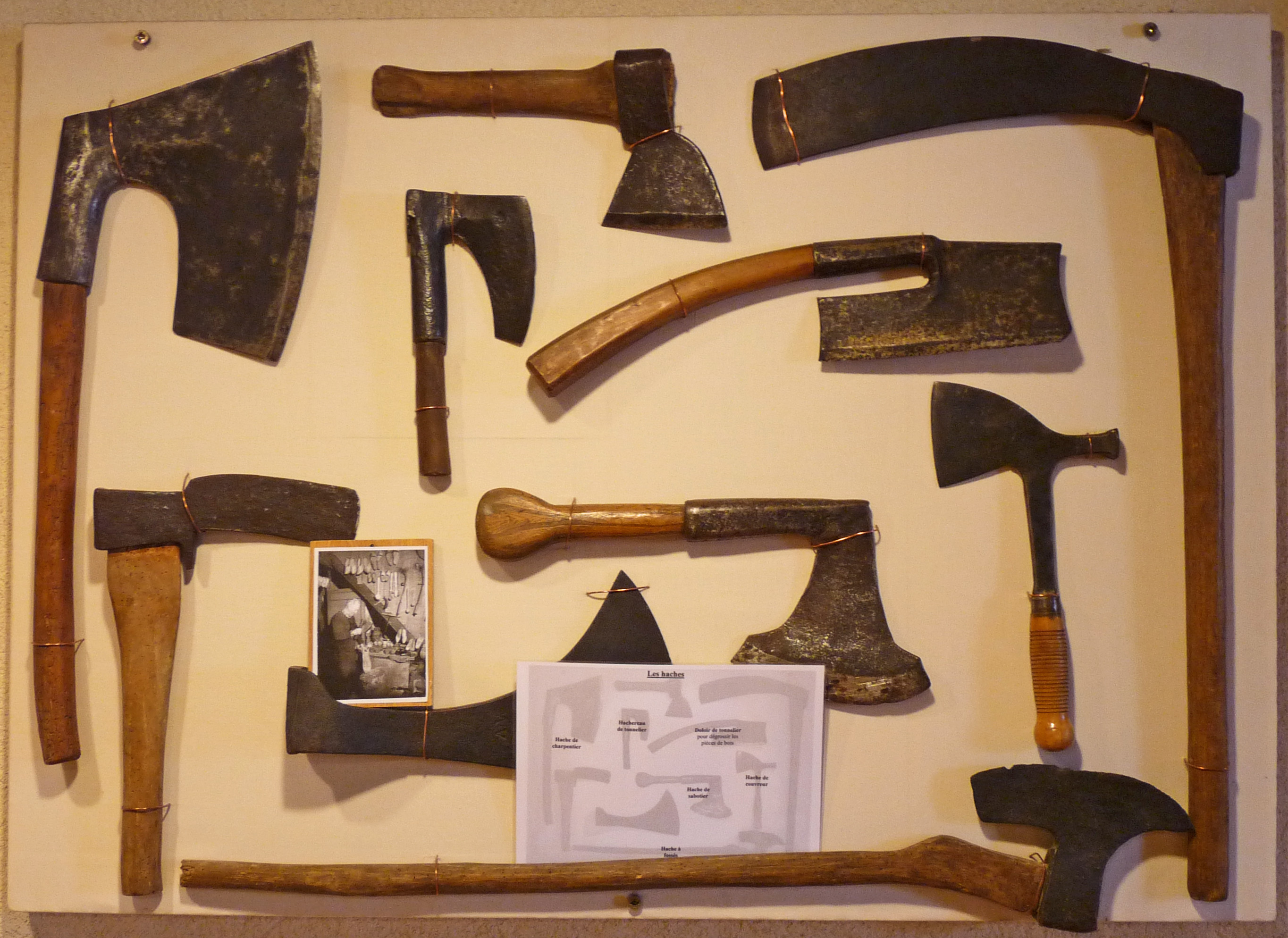 Assortiment de haches à la Maison de la Vannerie (Fayl-Billot, Haute-Marne). Hache de charpentier, hachereau de tonnelier, doloir de tonnelier pour dégrossir les pièces de bois, hache à fossés, hache de sabotier, hache de couvreur.